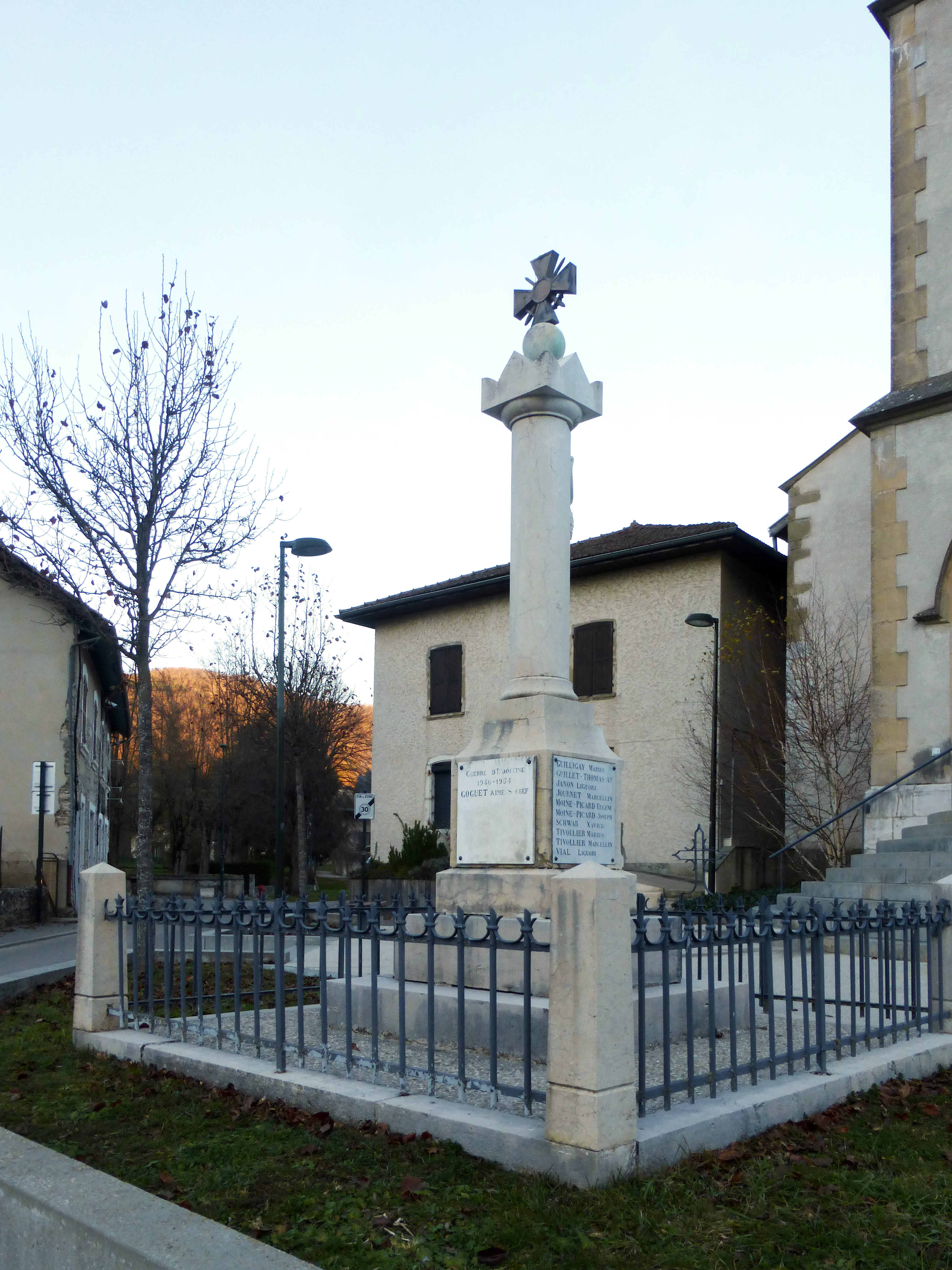 Monuments aux Morts Saint-Nicolas-de-Macherin, Isère, France. Décembre 2016